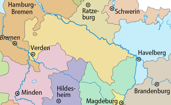 Bistum Verden vor der Reformation